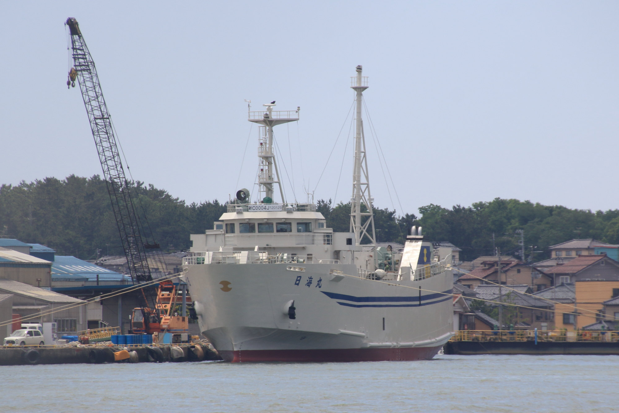 新潟造船に入渠中の日海丸。2020年に佐渡汽船のマークに塗り替えられた